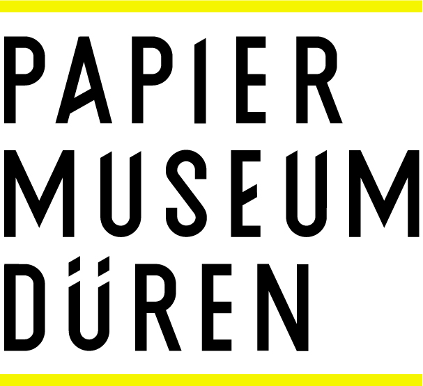 Logo des Papiermuseums Düren seit 2018